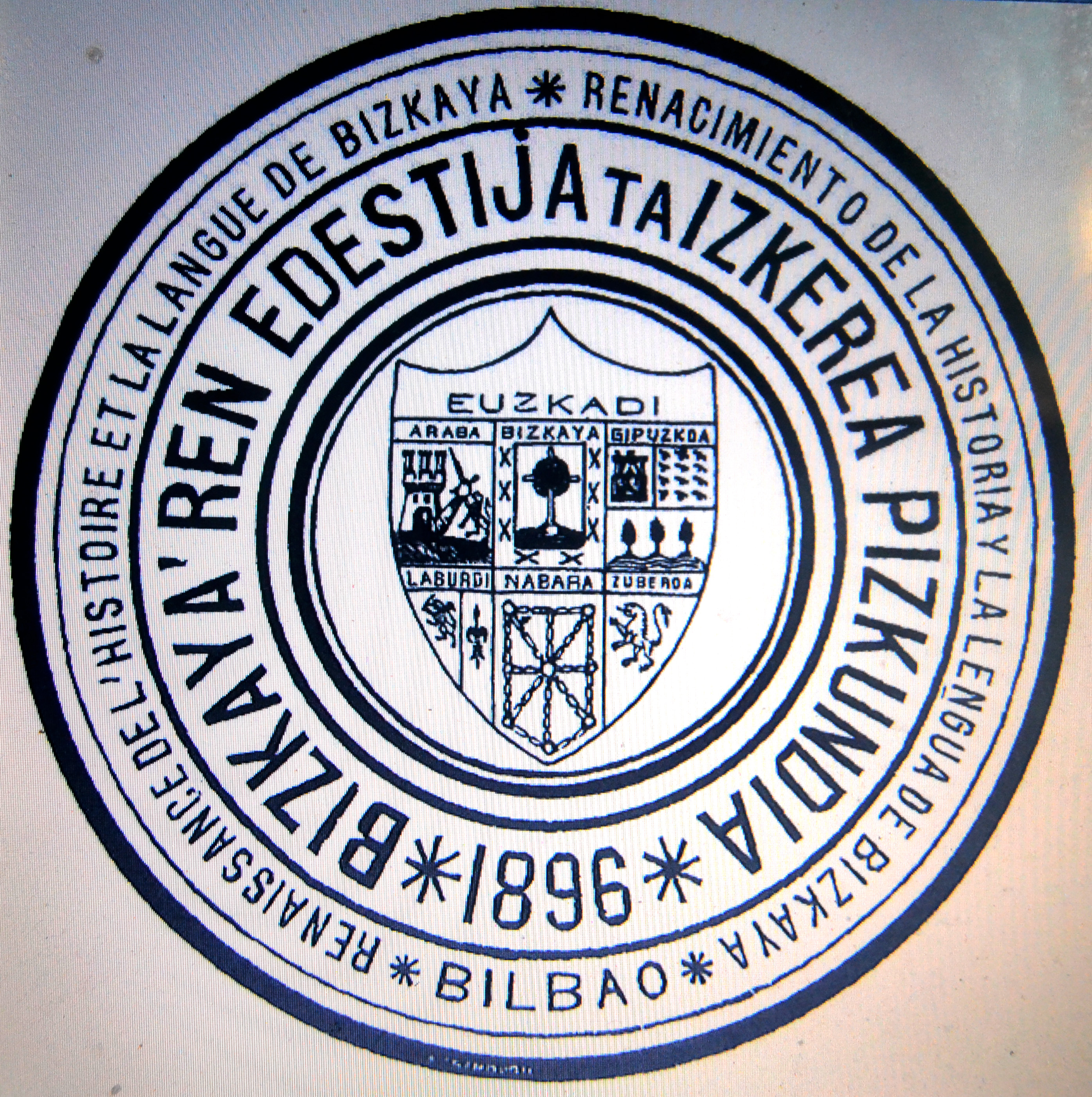 Bizkaya'ren Edestija ta Izkera Pizkundia, 1896